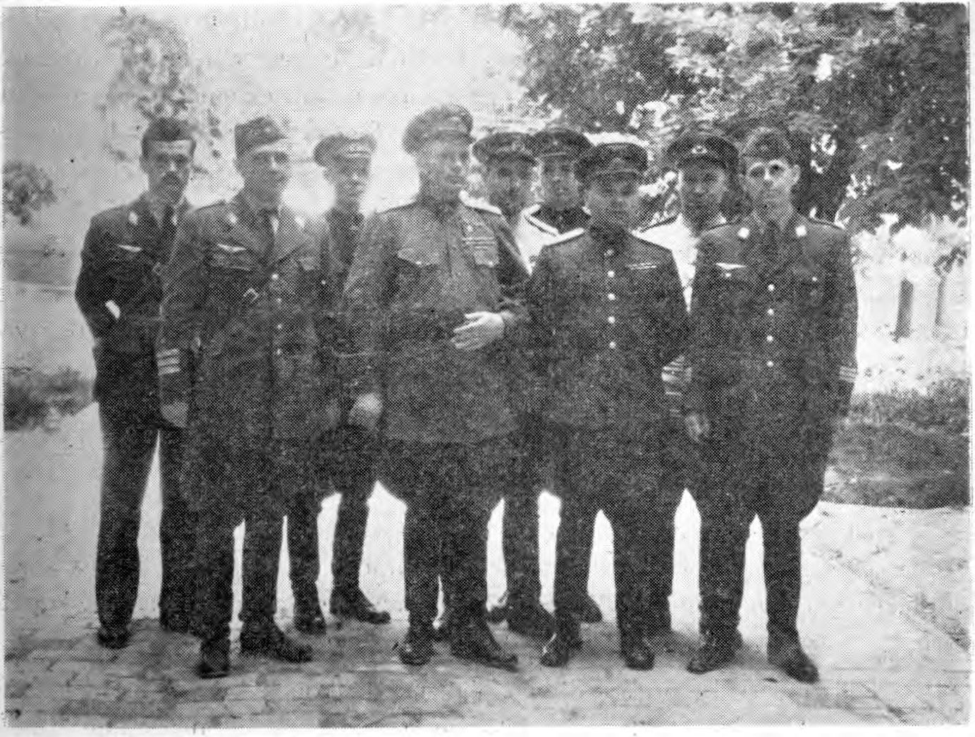 Štabovi grupe vazduhoplovnih divizija, 1944